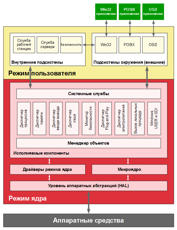 Блок-диаграмма архитектуры Windows 2000 File:Windows 2000 architecture-ru.svg is a vector version of this file. It should be used in place of this raster image when not inferior. File:Архитектура Windows NT.PNG File:Windows 2000 architecture-ru.svg For more information, see Help:SVG. In other languages